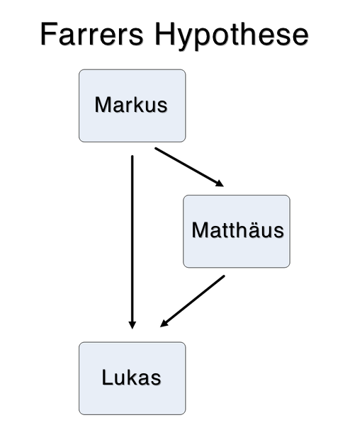 Schema der Theorie Austins Farrers, seine Lösung des Synoptischen Problems